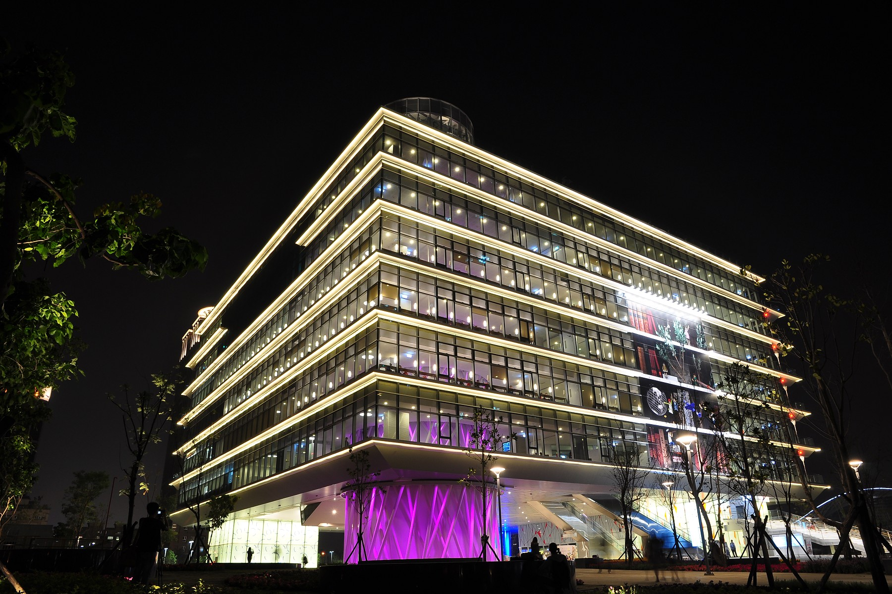 高雄市立圖書館總館夜景